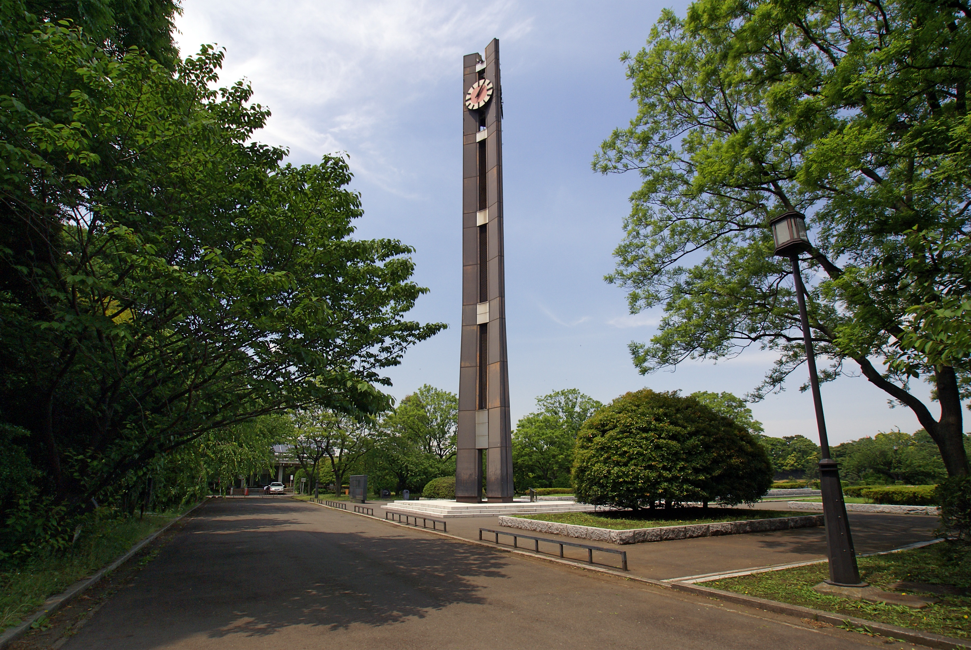 Kensei-kinenkan Chiyoda-ku, Tokyo, Japan